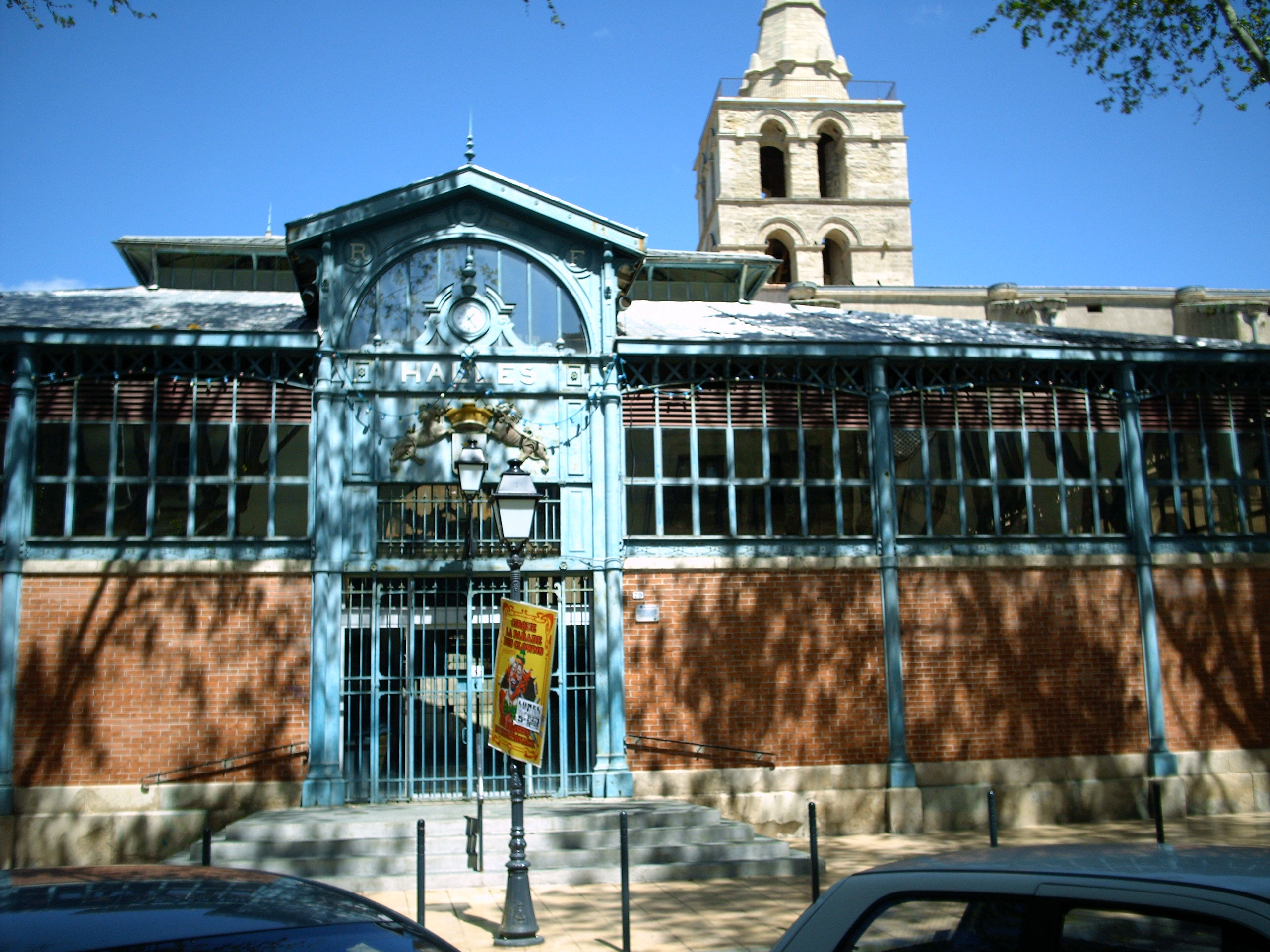 Les anciennes halles de Lunel et le clocher de Notre Dame du Lac (Hérault)